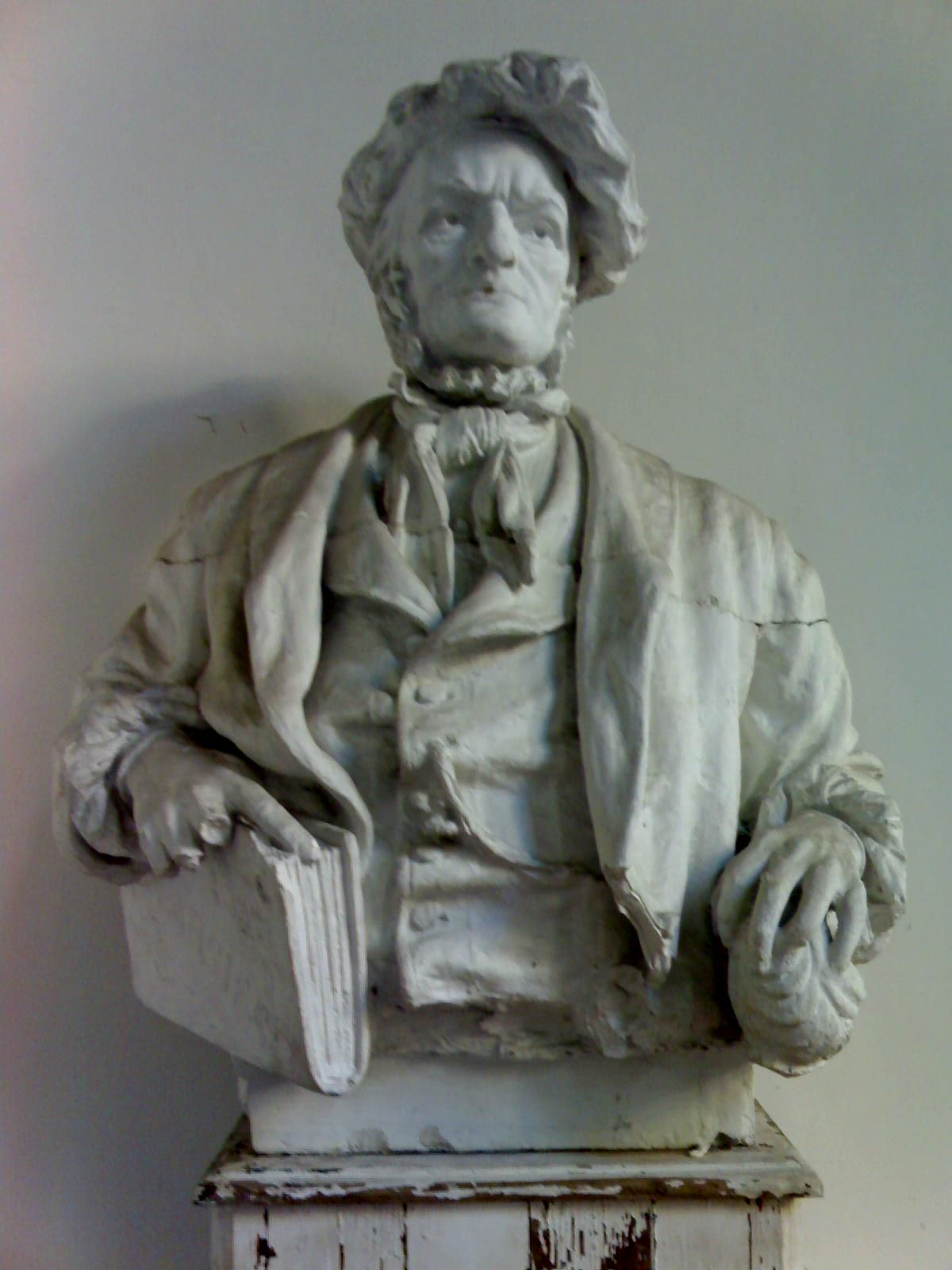 Busto in gesso di Richard Wagner all'interno del conservatorio di San Pietro a Majella (Napoli)